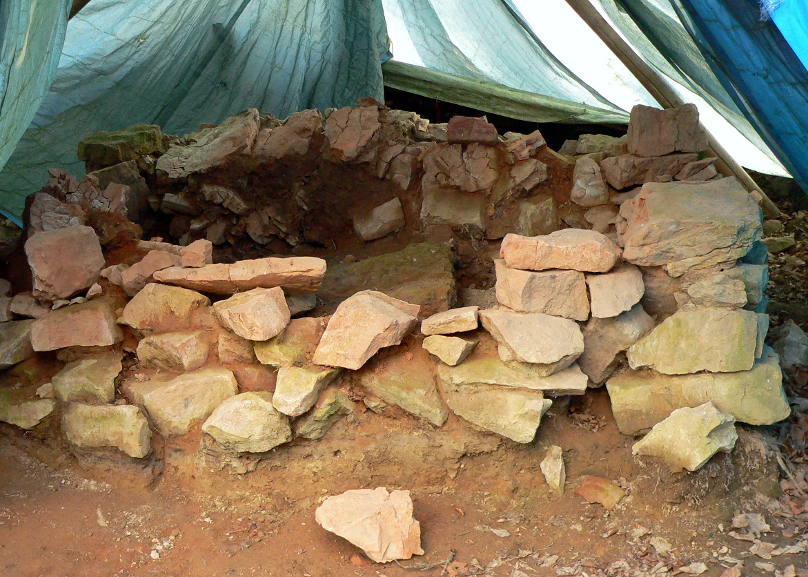 Freigelegter Ofen der Waldglashütte unter dem Hilsborn